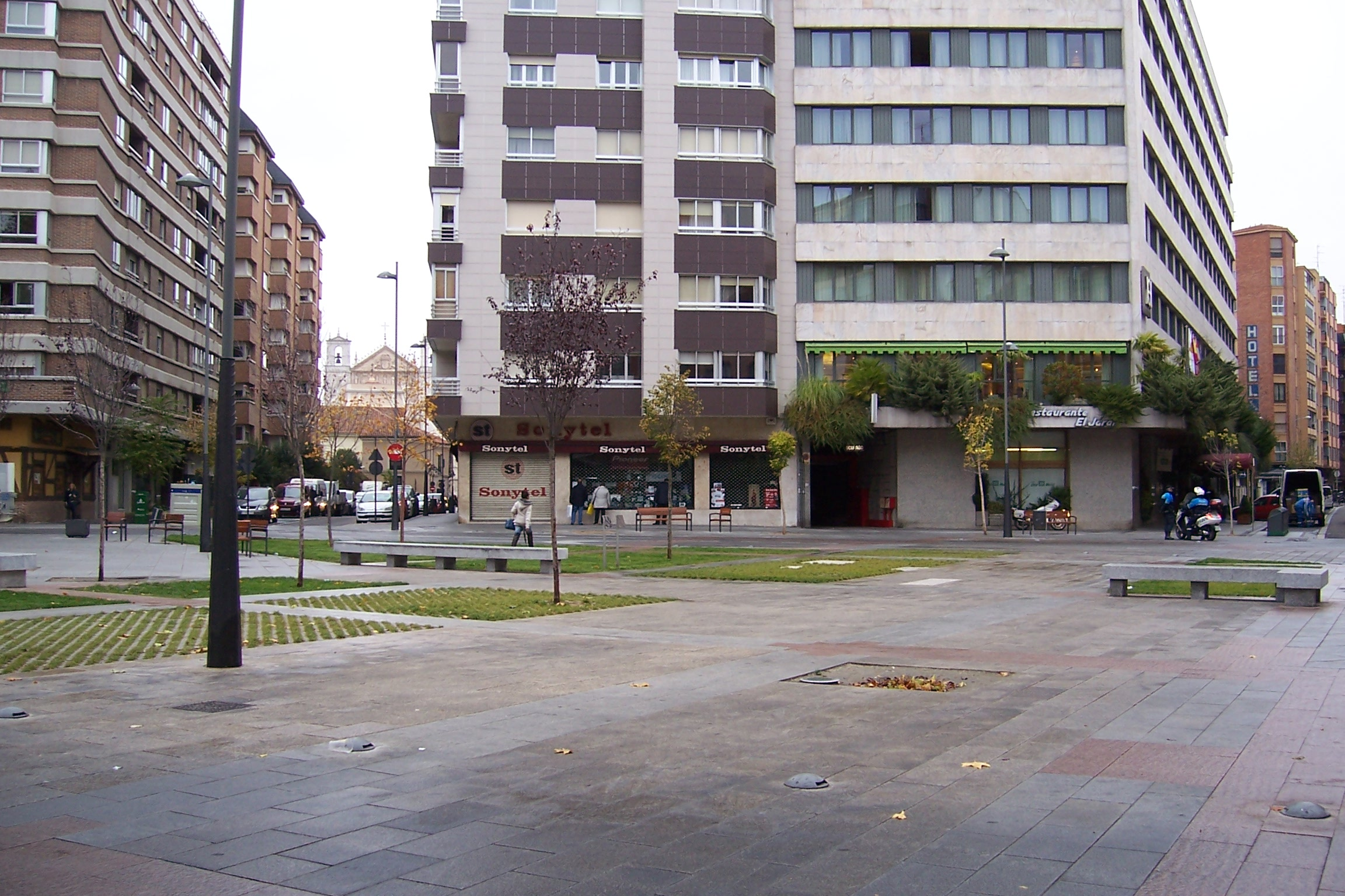 Plaza de San Miguel en Valladolid (España). Así quedó la plaza después de las obras del 2009. Queda marcado en el suelo dónde estuvo la iglesia de San Miguel.